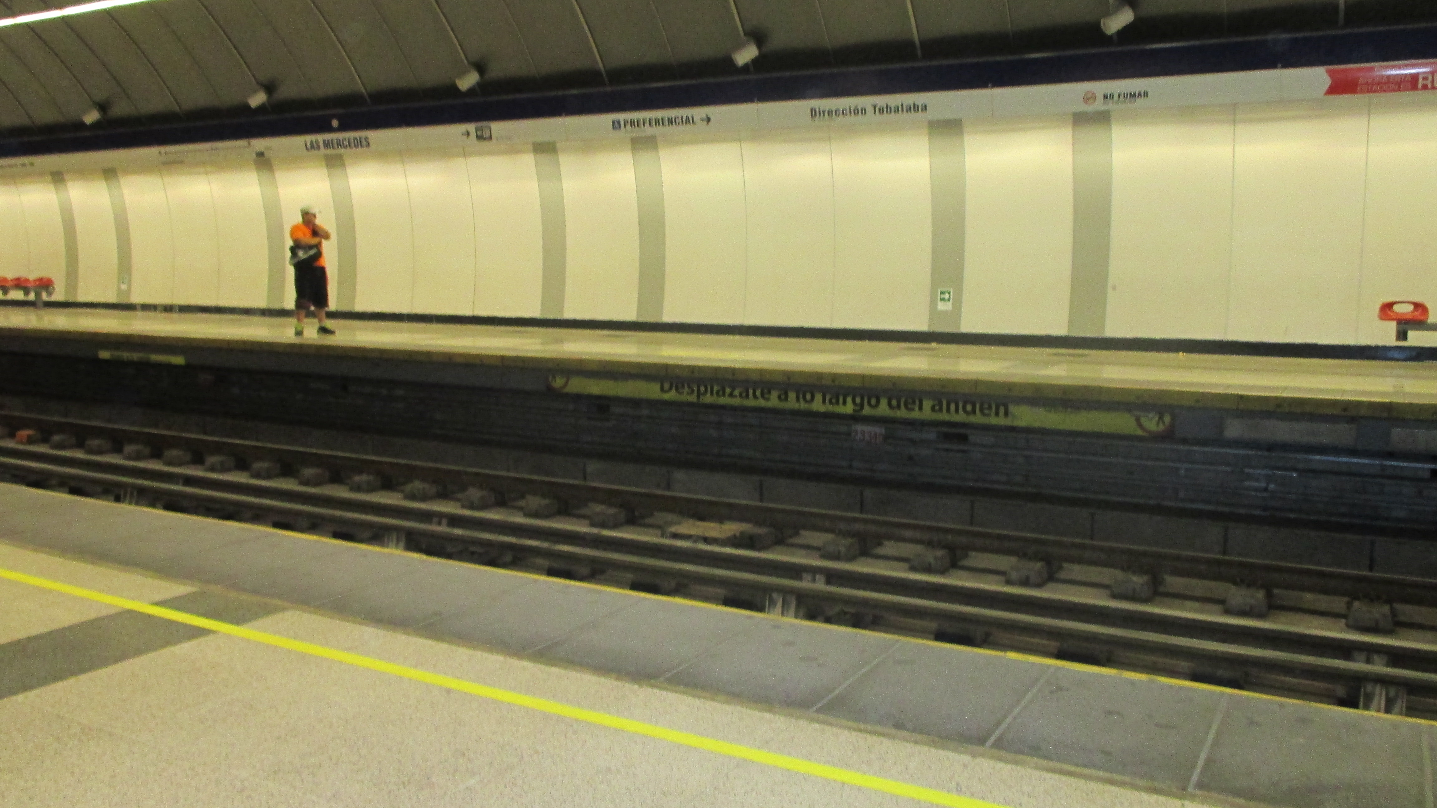 Estación Las Mercedes